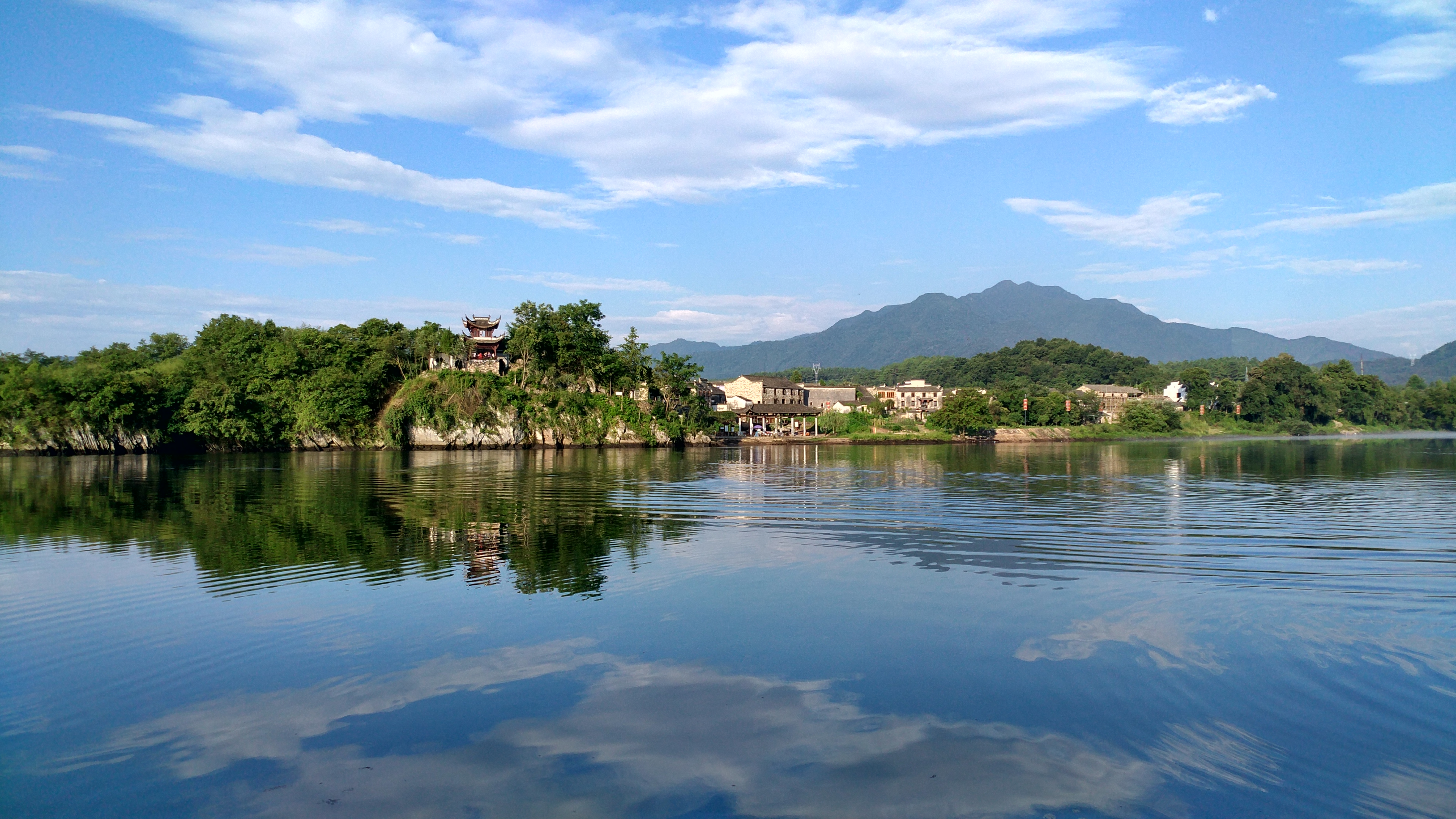 泾县桃花潭